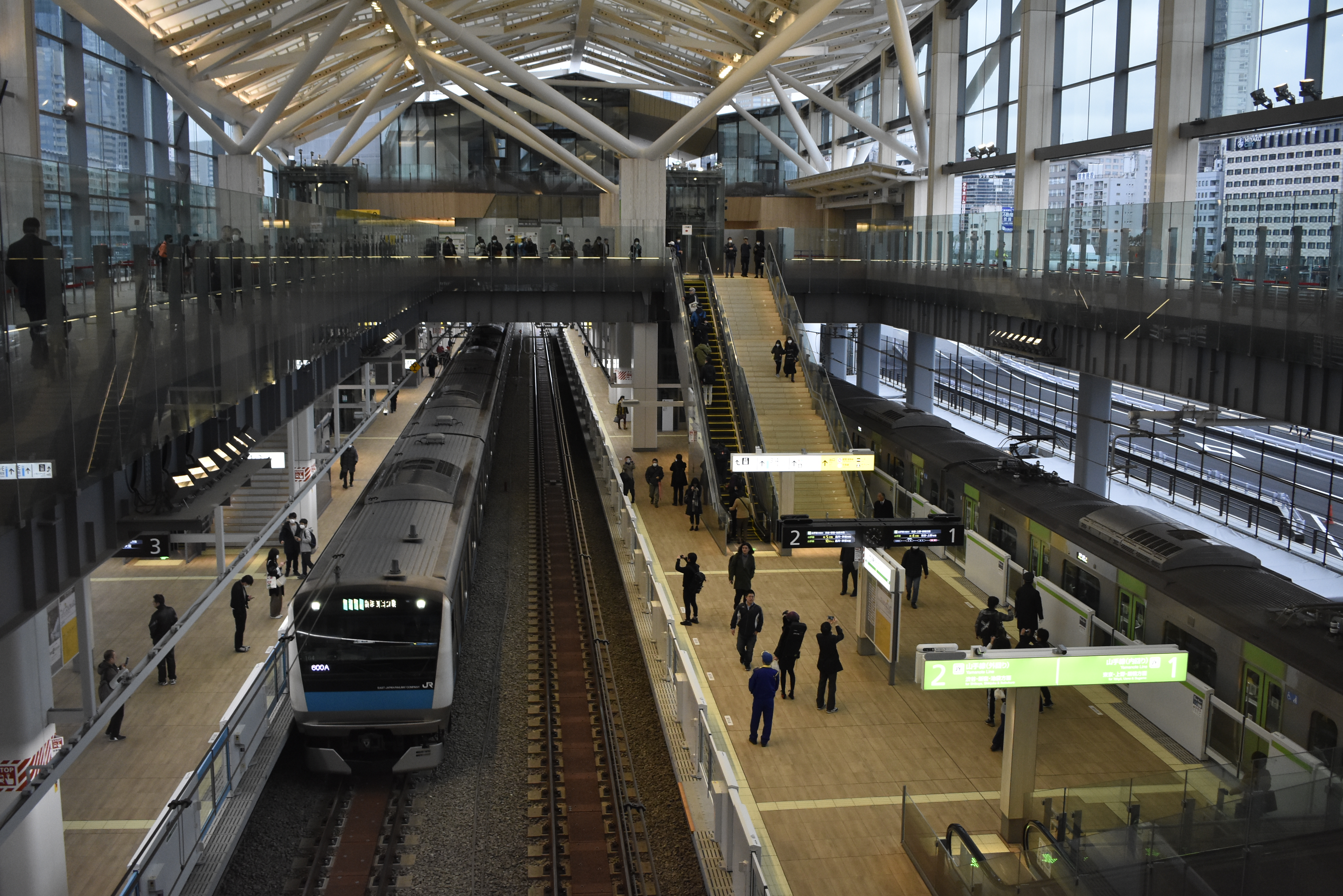 高輪ゲートウエイ駅